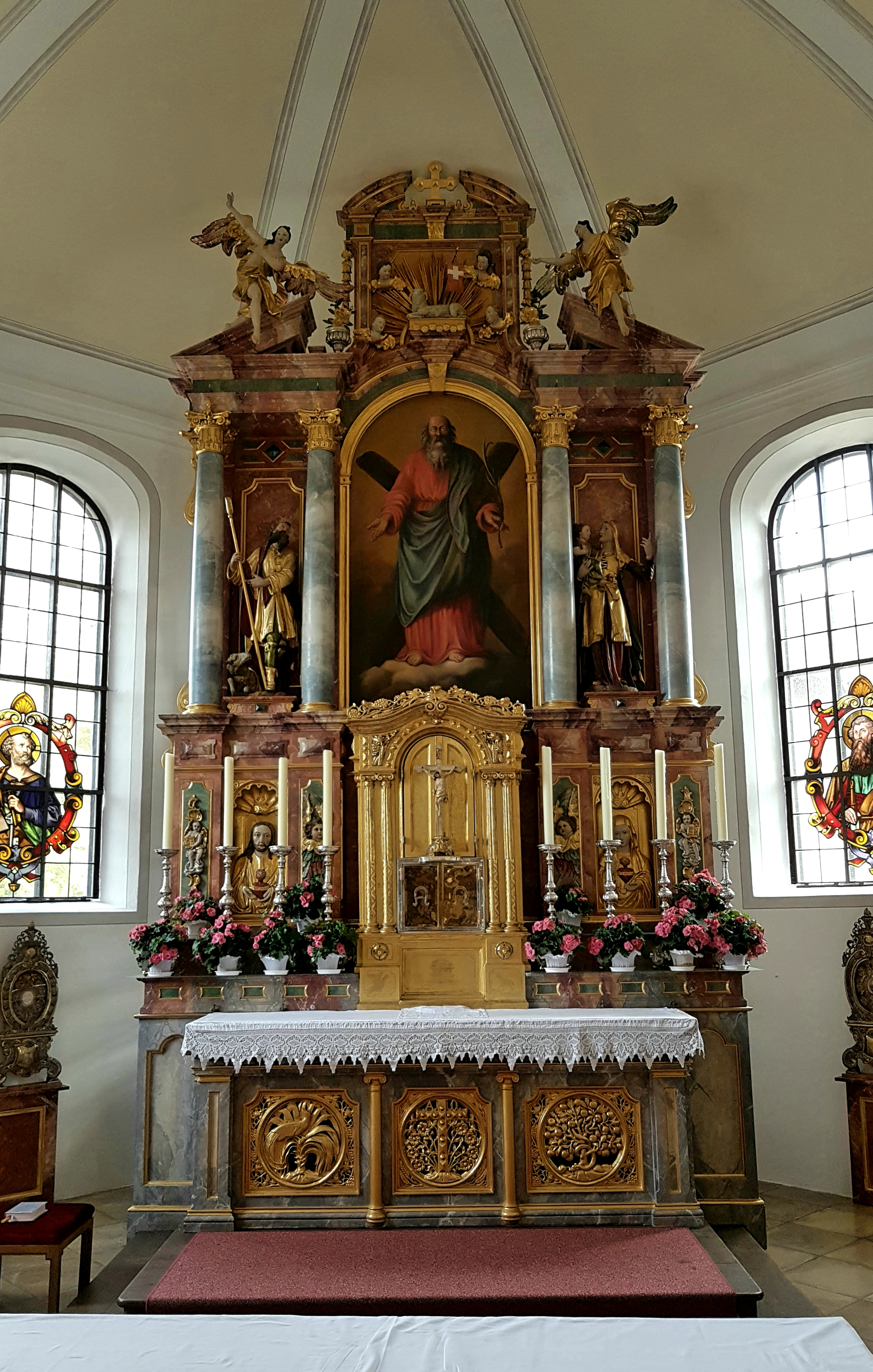 Sankt Andreas (Sauerlach), Hochaltar.